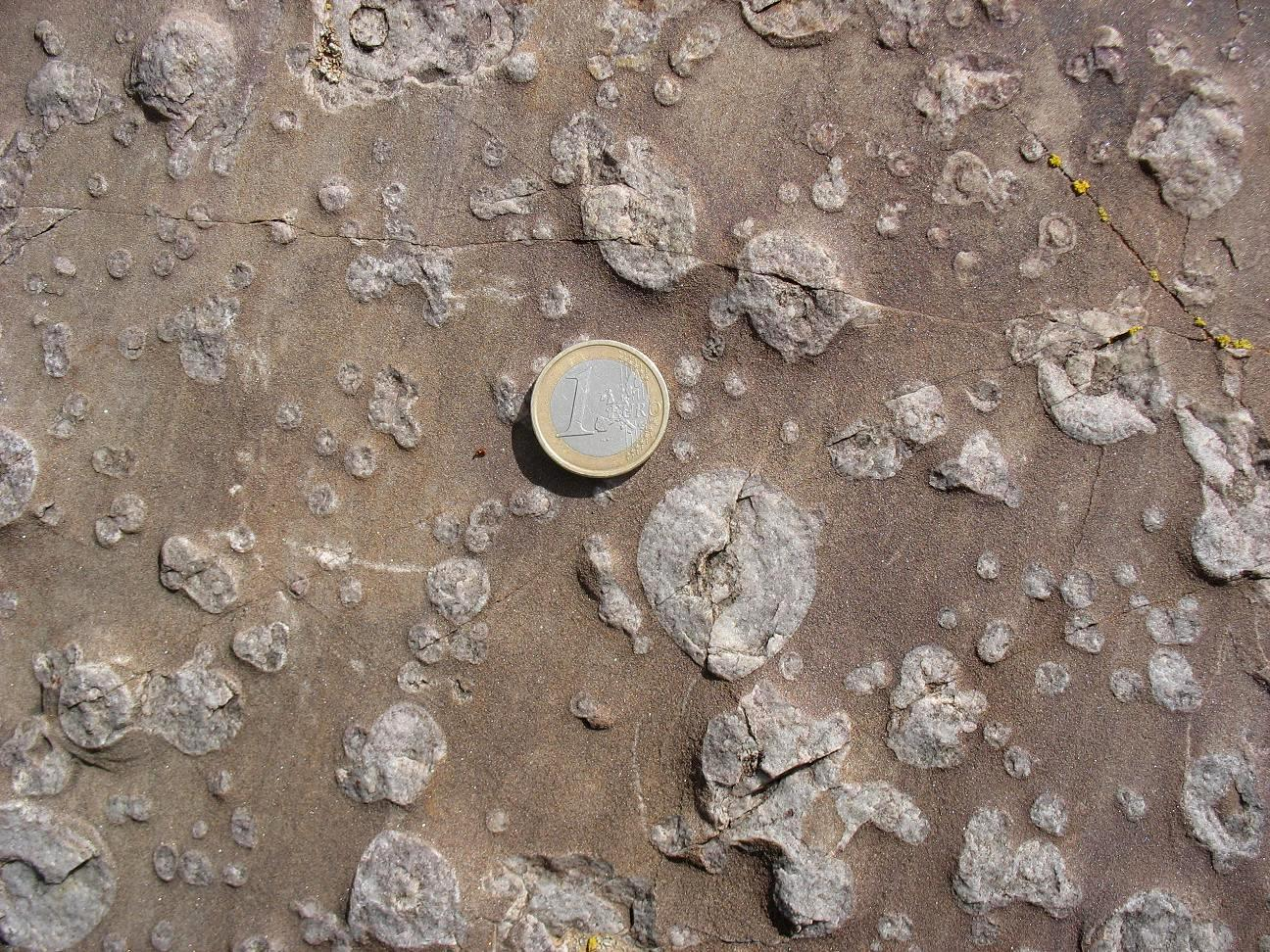 Vista superior de Skolithos dufrenoyi y Skolithos ichnosp. Cuarcita armoricana, Ordovícico. La roca forma parte de los sillares del yacimiento celtibérico de El Castellar. Berrueco, Zaragoza, España. (Moneda de escala: 1 EUR, Ø 23,25 mm)